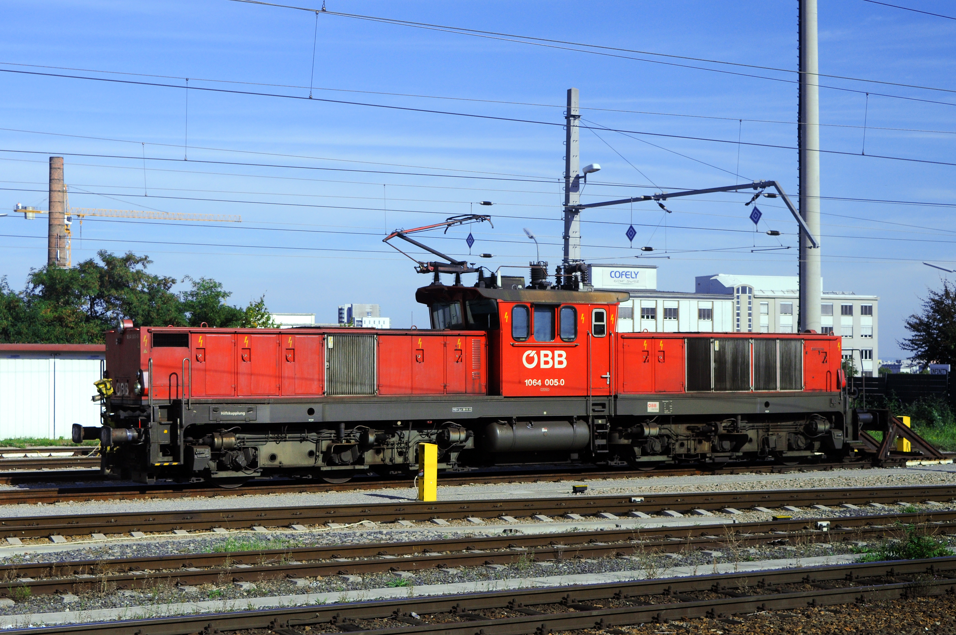 1064 005 am Traktionsstützpunkt Wien Grillgasse.